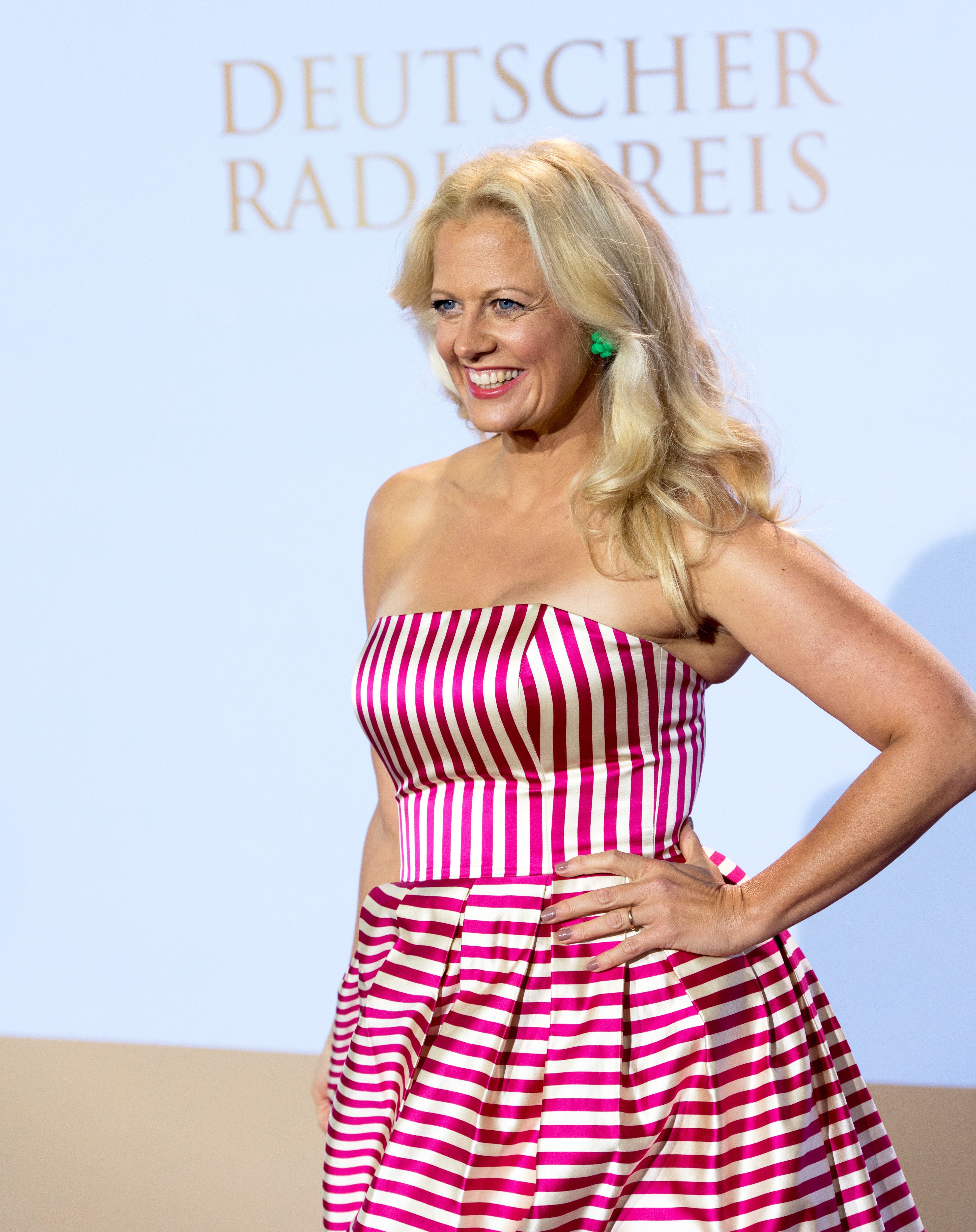 Barbara Schöneberger beim Deutschen Radiopreis 2016 im Schuppen 62 in Hamburg